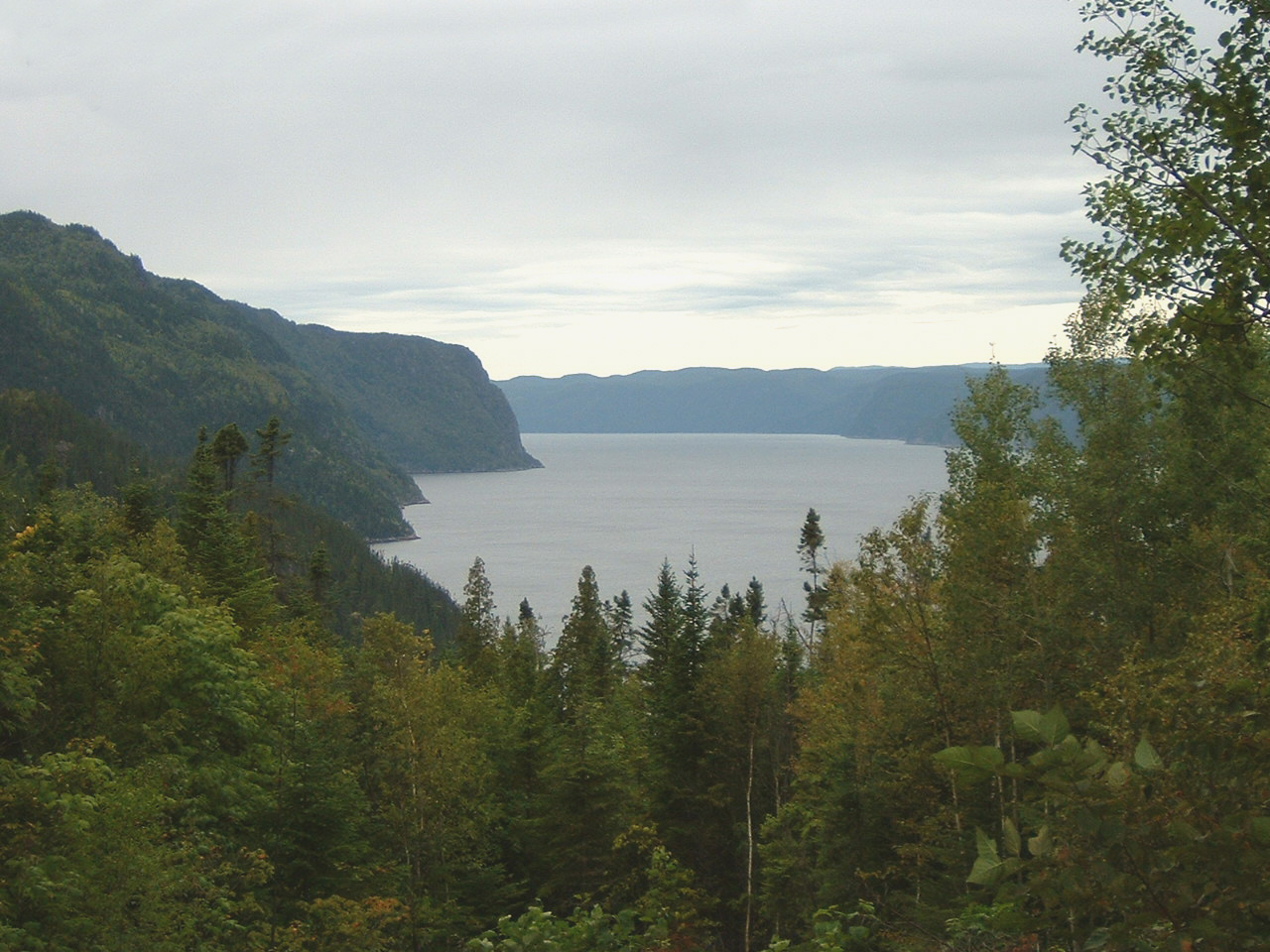 Photo du fjord du Saguenay vue de l'anse de Tabatière prise le 17 septembre 2004 à l'Anse-Saint-Jean (Québec)